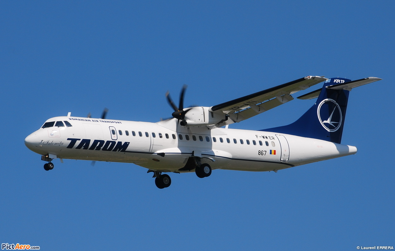 Photo prise à l'aéroport de Toulouse-Blagnac (LFBO) en France. Picture take at Toulouse-Blagnac Airport (LFBO) in France.